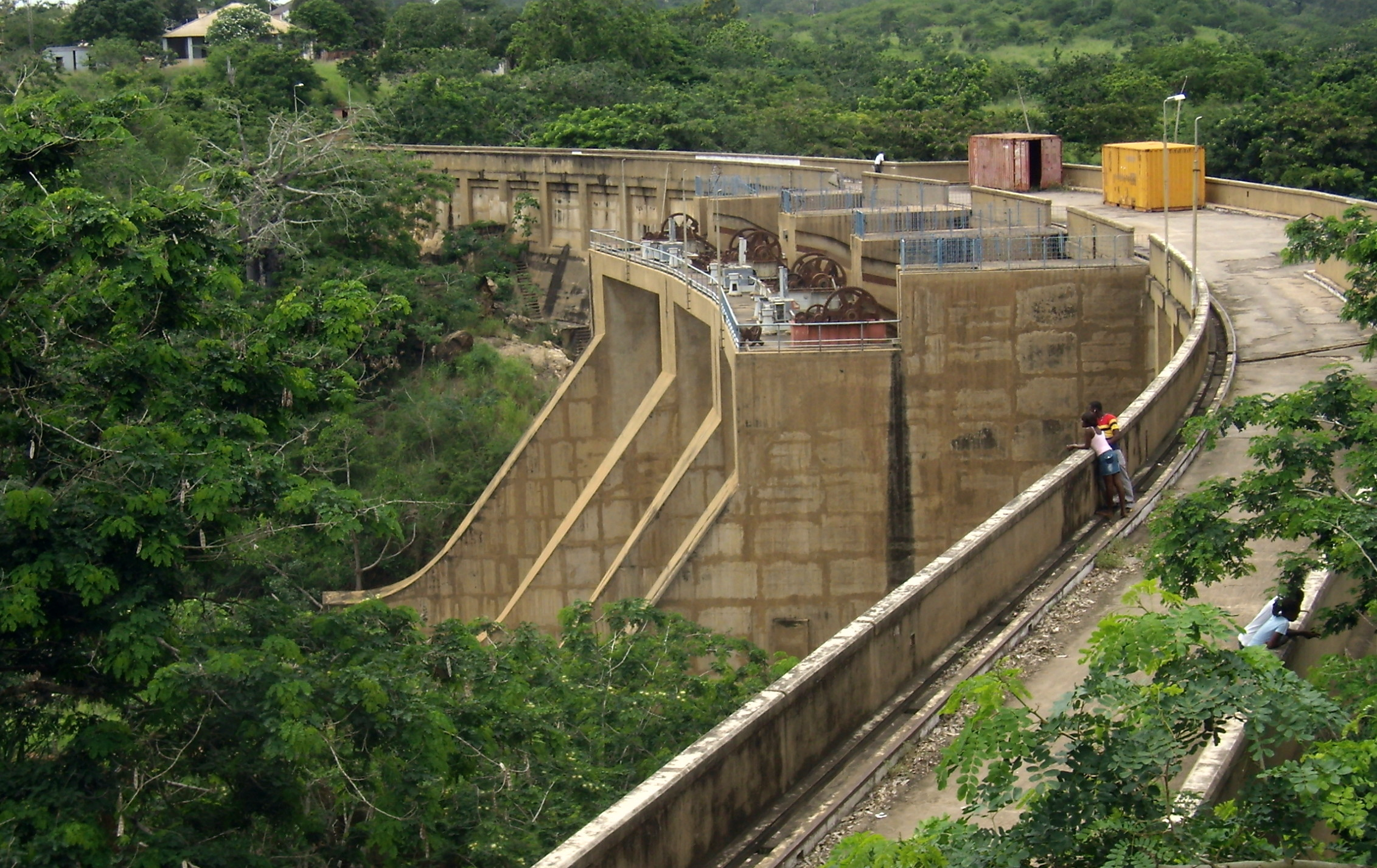 Barragem das Mabubas